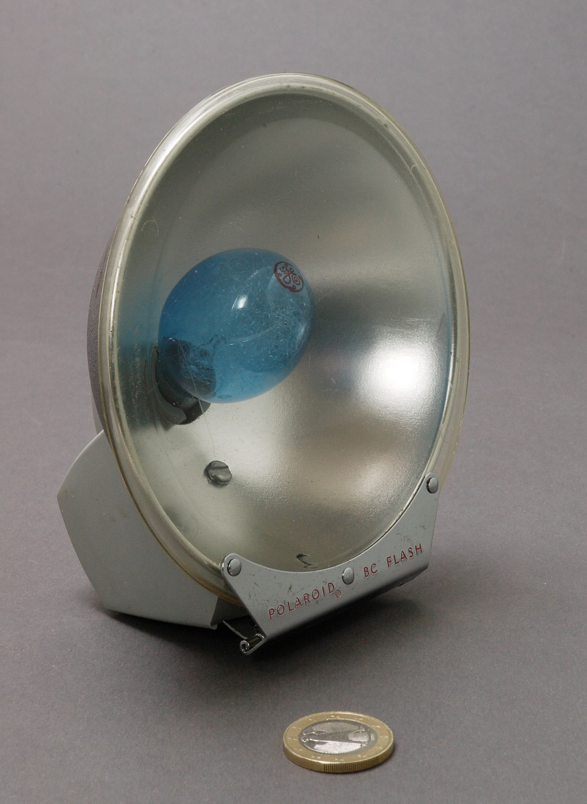 Polaroid BC FLASH model 281